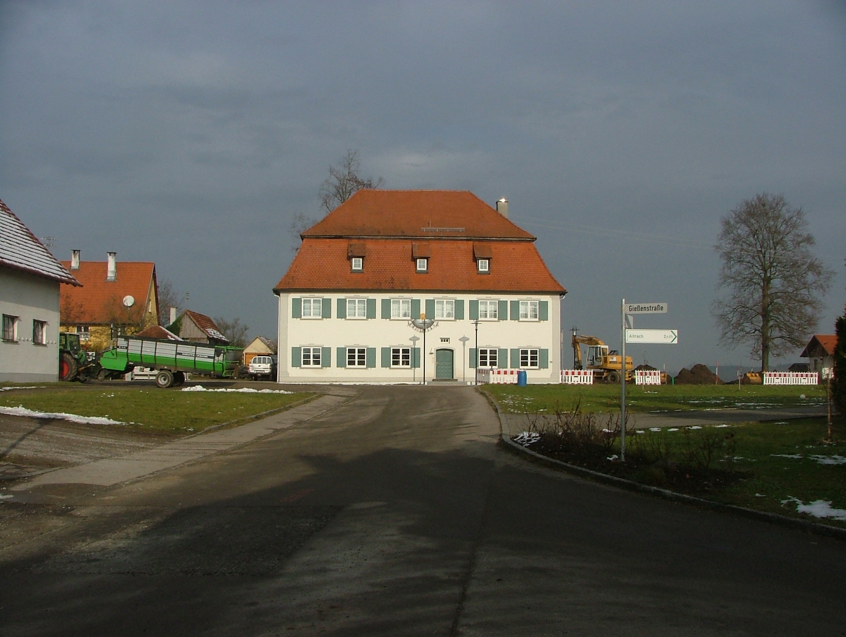 Guardinihaus